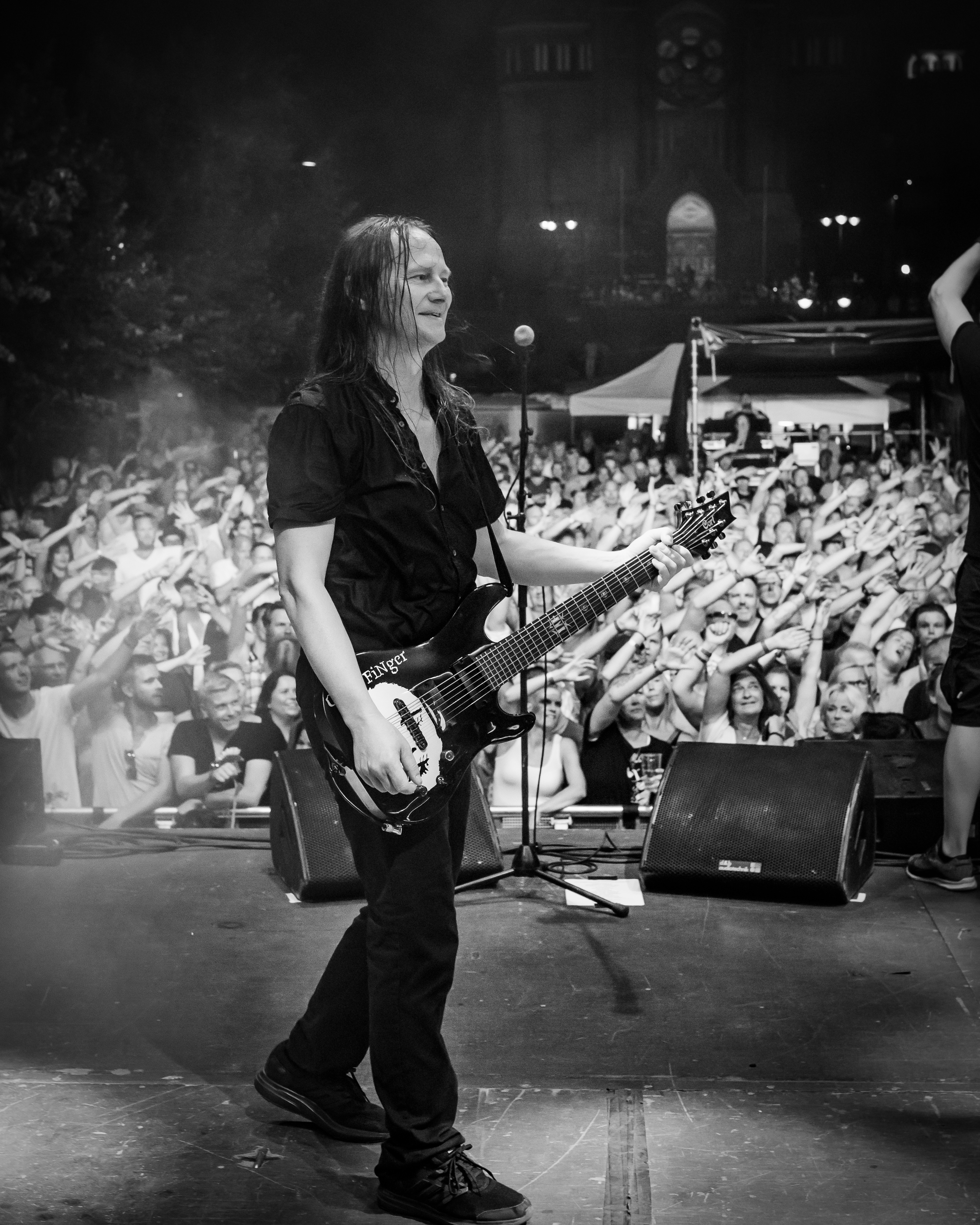 Clawfinger var headliner for Canal Street 2018.